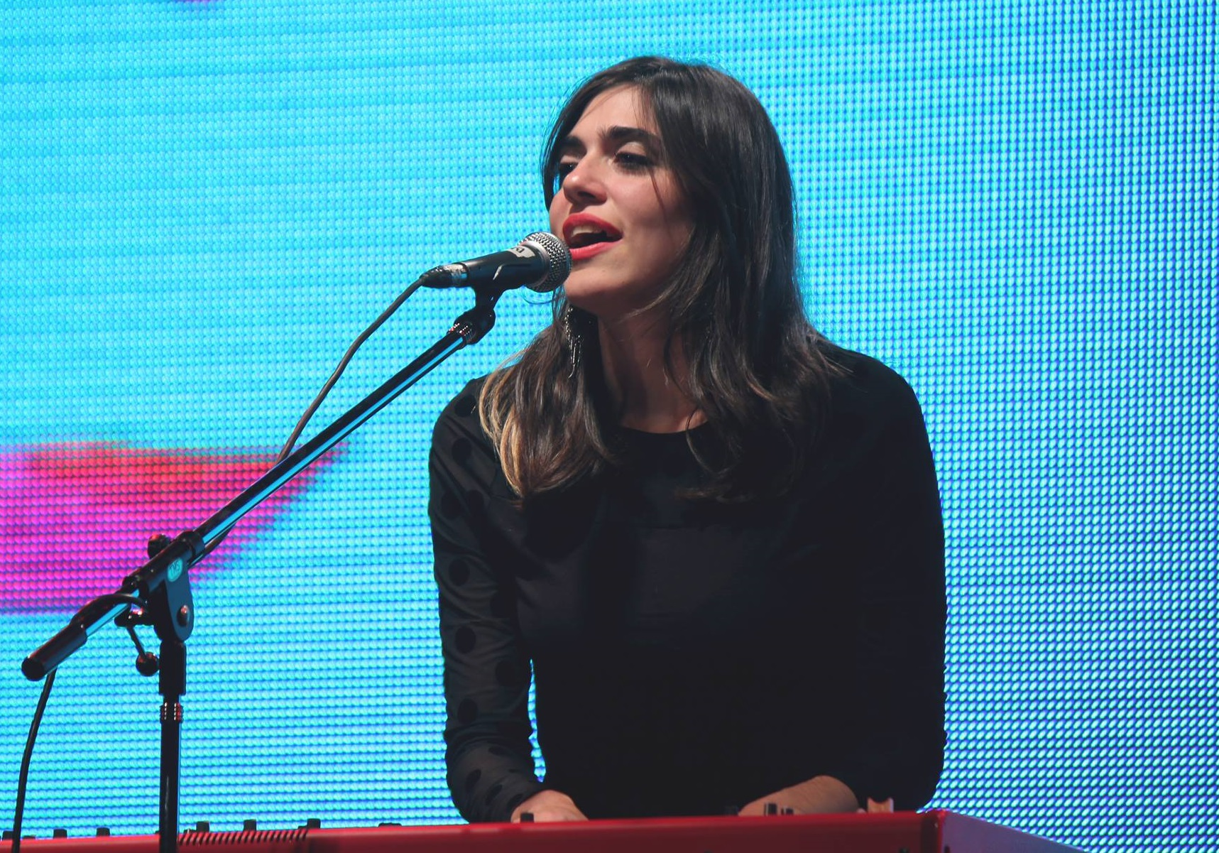 Bárbara Gilles en vivo.